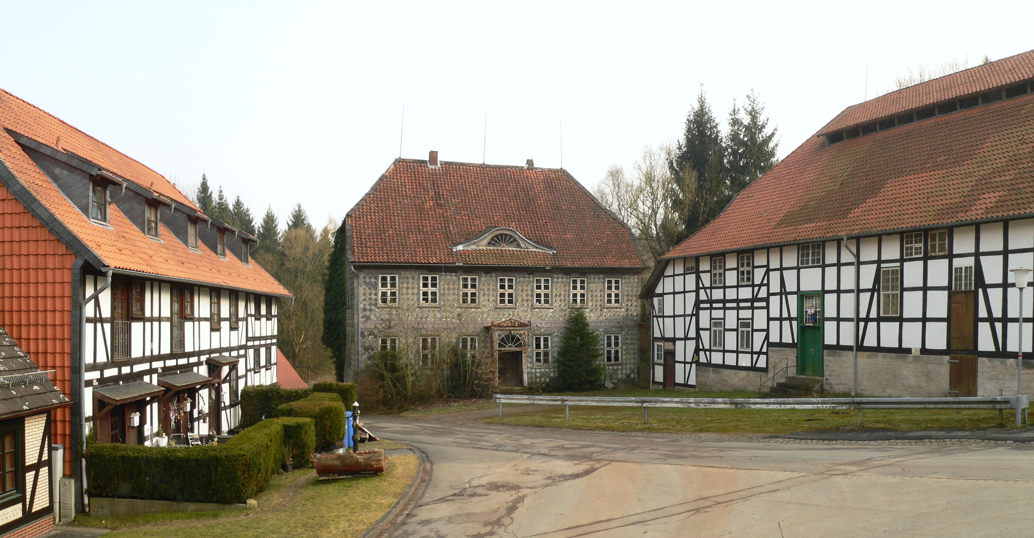 Stendersche Glasfabrik